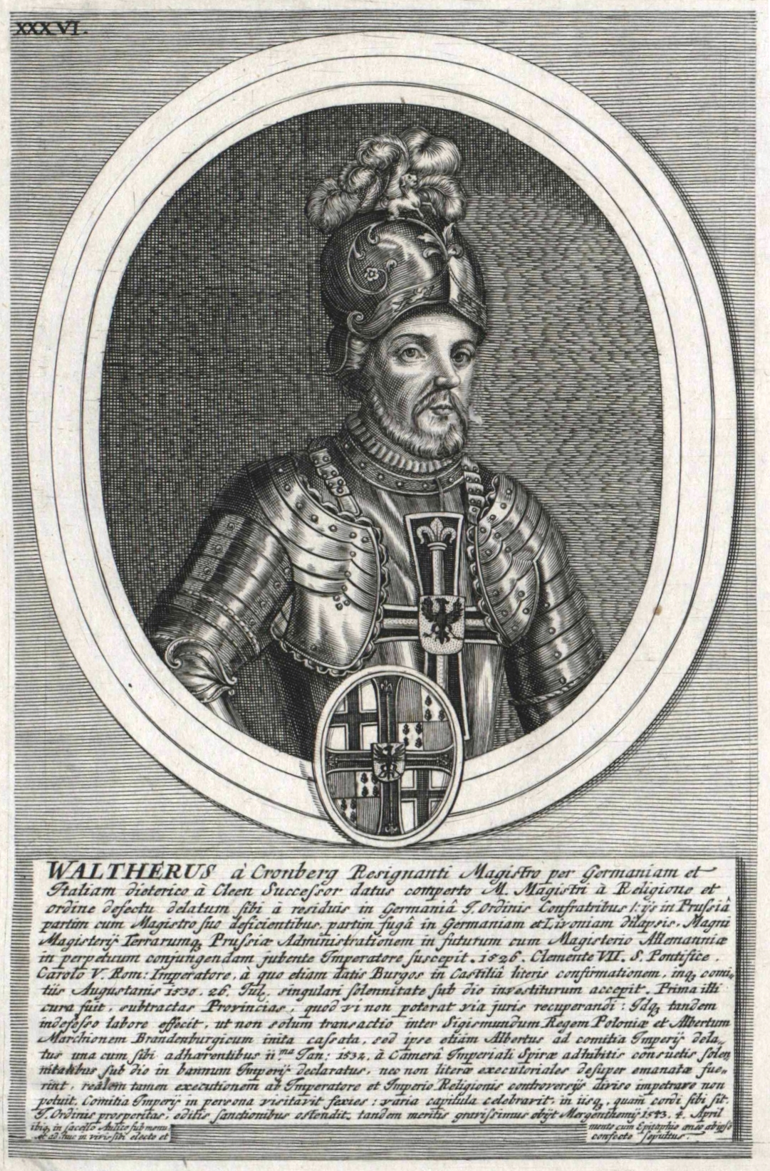 Walther von Cronberg (1477–1543)